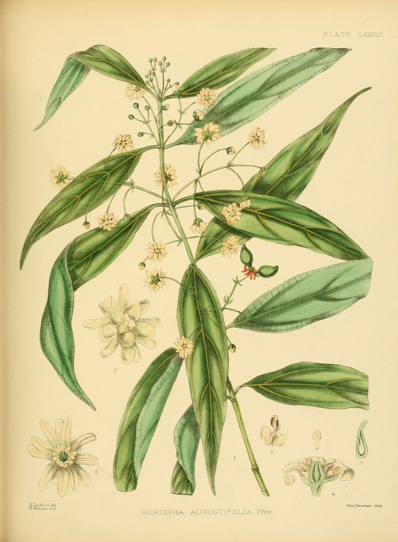 ATE HOKTONIA AUGUSTIFOLIA Thtv. Vfest,?fev«2iazi nnji